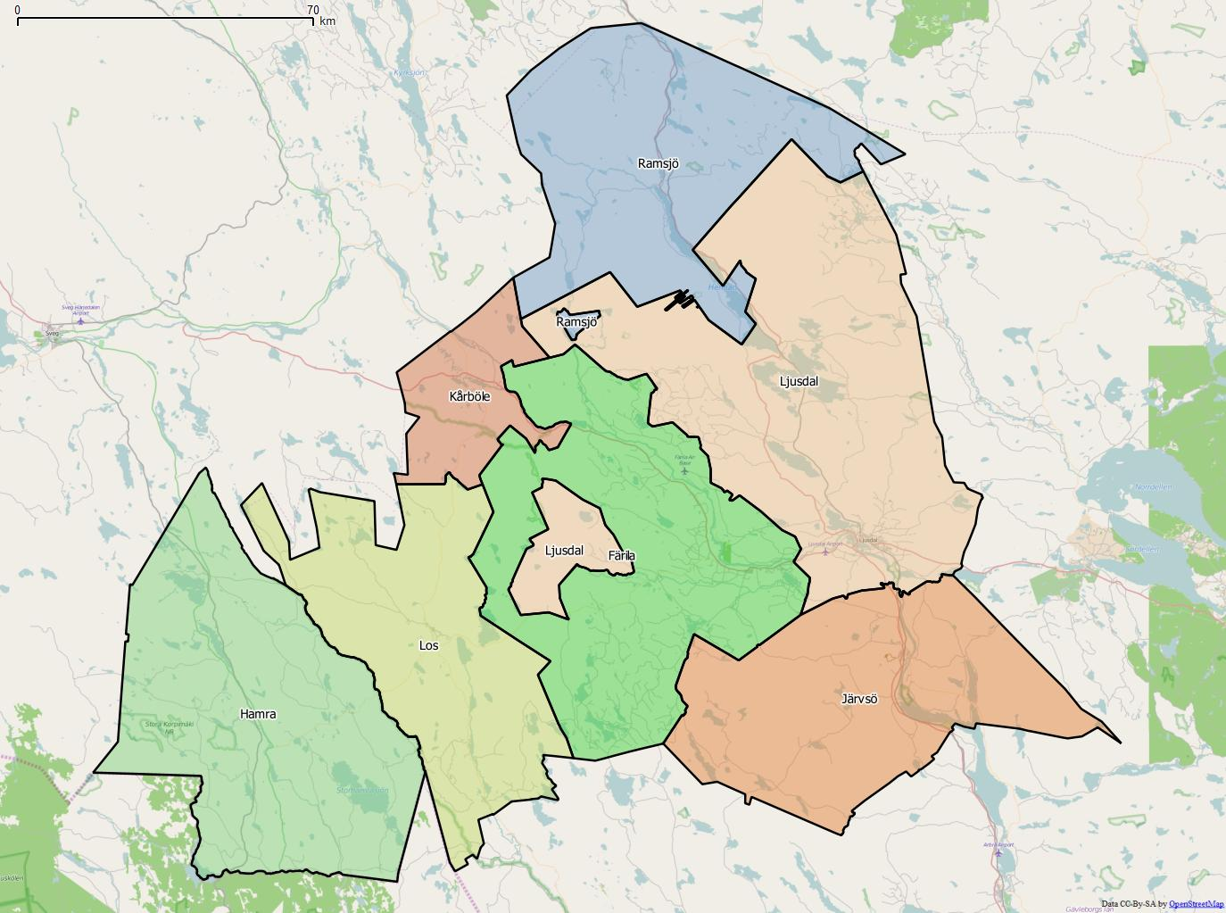 Distriktsindelningen i Ljusdals kommun World file: 211.21249607818262461 0 0 -211.21249607818262461 1586253.91989221959374845 8946411.34677649475634098